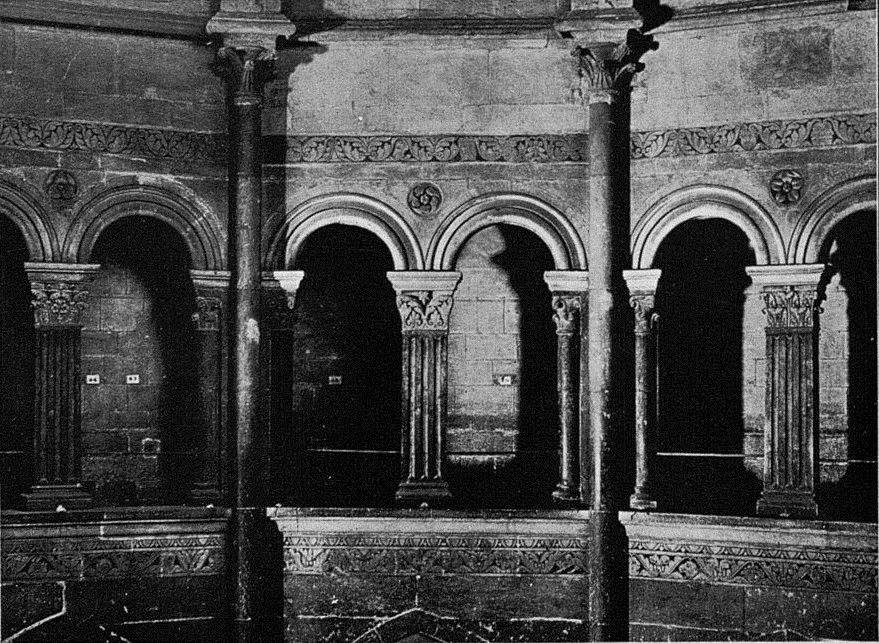 Triforium de l'abside de la primatiale Saint-Jean, à Lyon : construit à la fin du douzième siècle, il est de style roman.